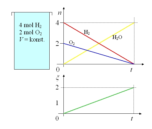 Az anyagmennyiségek és a reakciókoordináta változása az idő függvényében a 2H 2 + O 2 = 2H 2 O reakció esetén